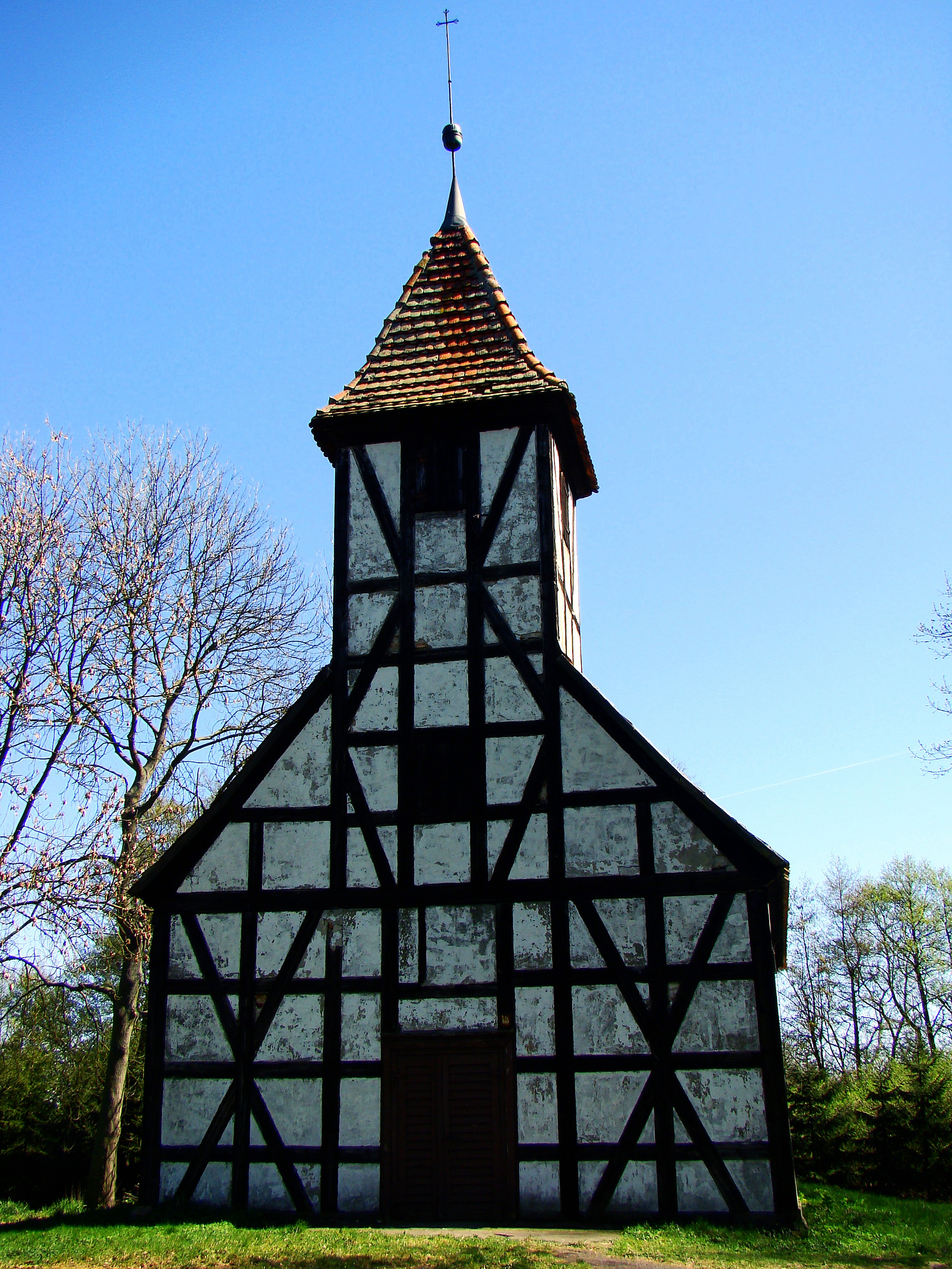 Warnołęka - dawny kościół ewangelicki, obecnie rzymskokatolicki filialny p.w. Matki Boskiej Częstochowskiej, 1 poł. XVIII